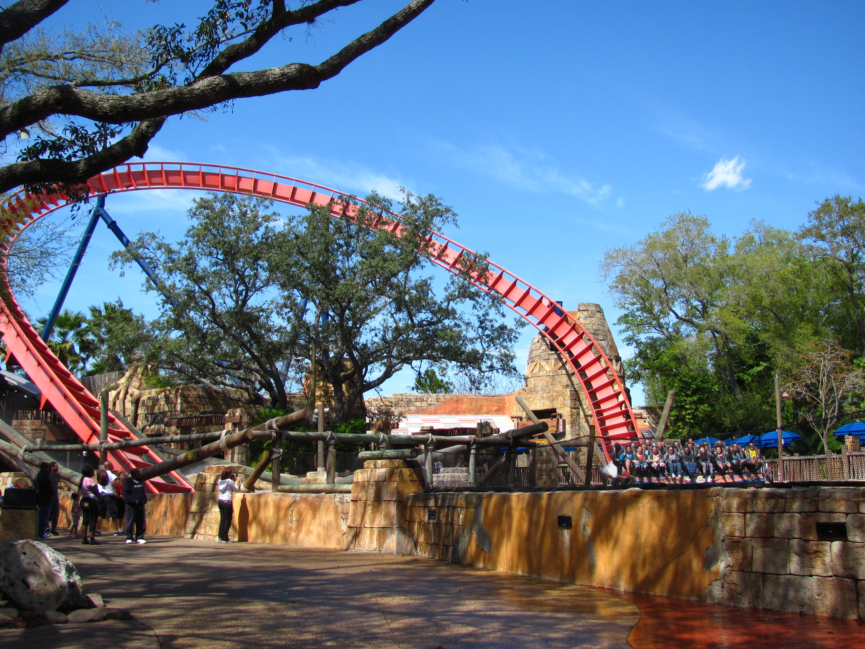 SheiKra